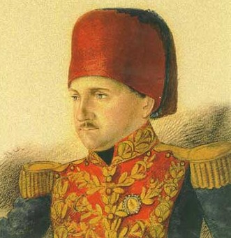 Portret Giuseppe Donizetti Pasha